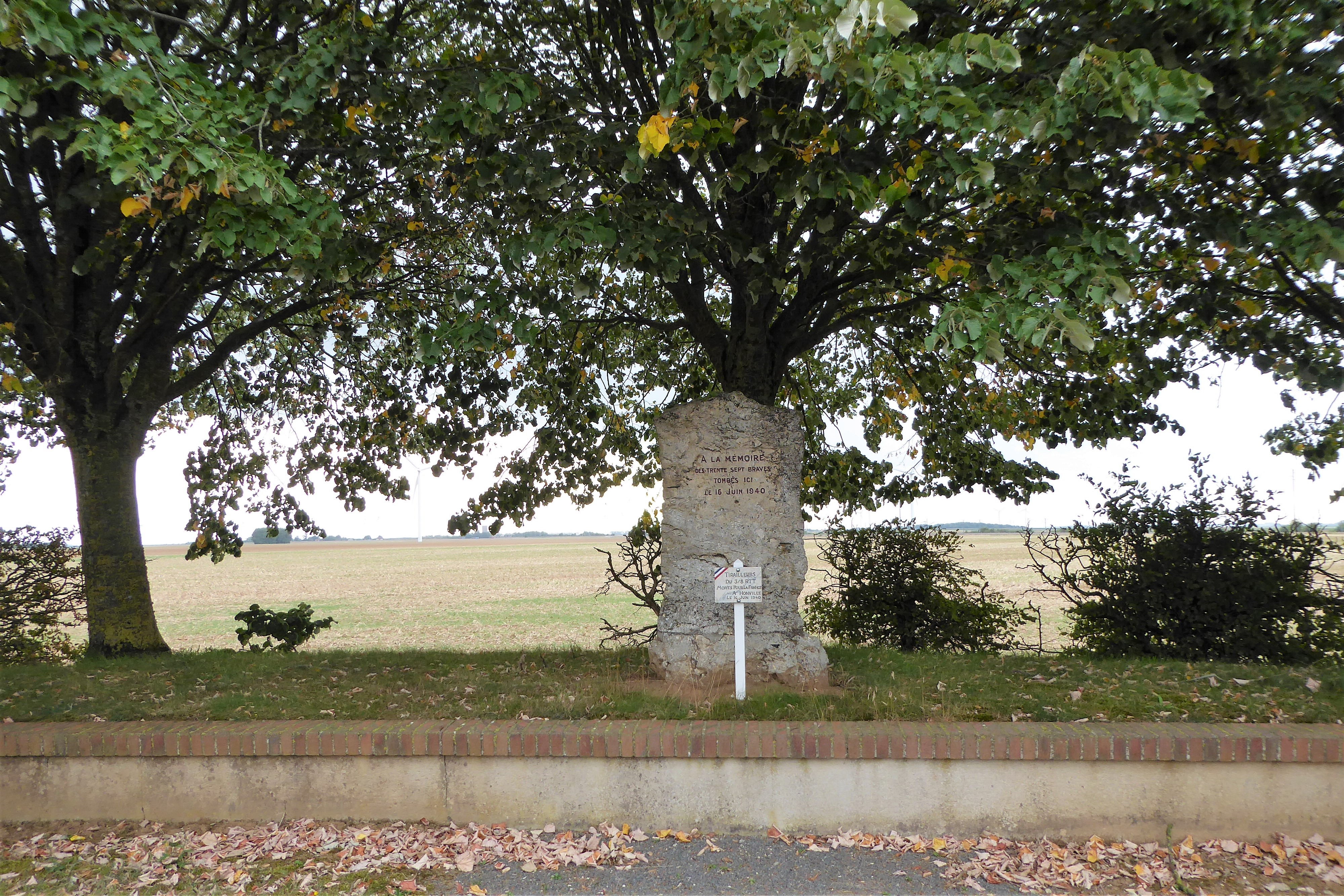 stèle rue du 8ème Régiment de Tirailleurs Tunisiens, Honville, Boisville-la-Saint-Père, Eure-et-Loir, France.